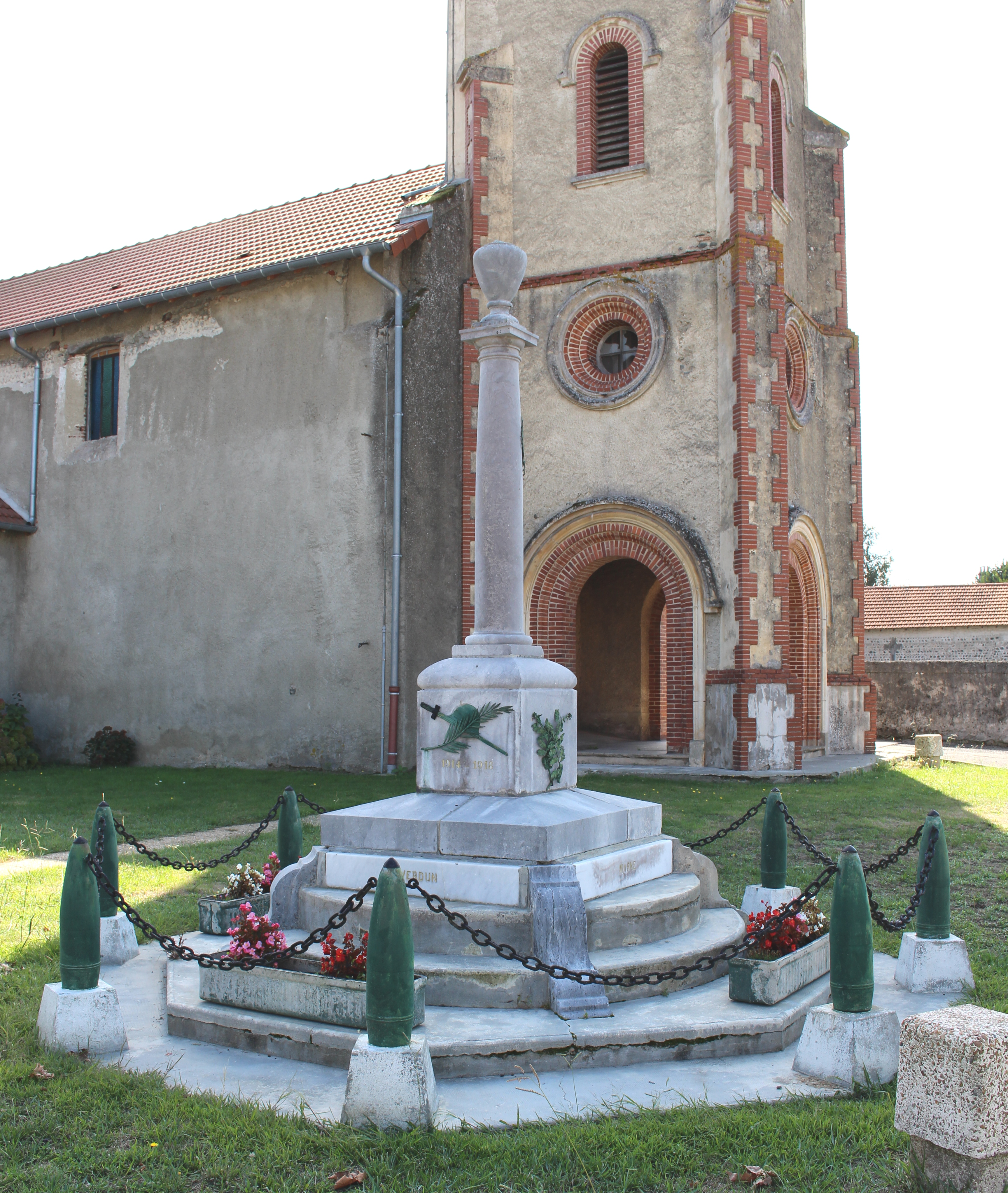 Monument aux morts de Liac (Hautes-Pyrénées)